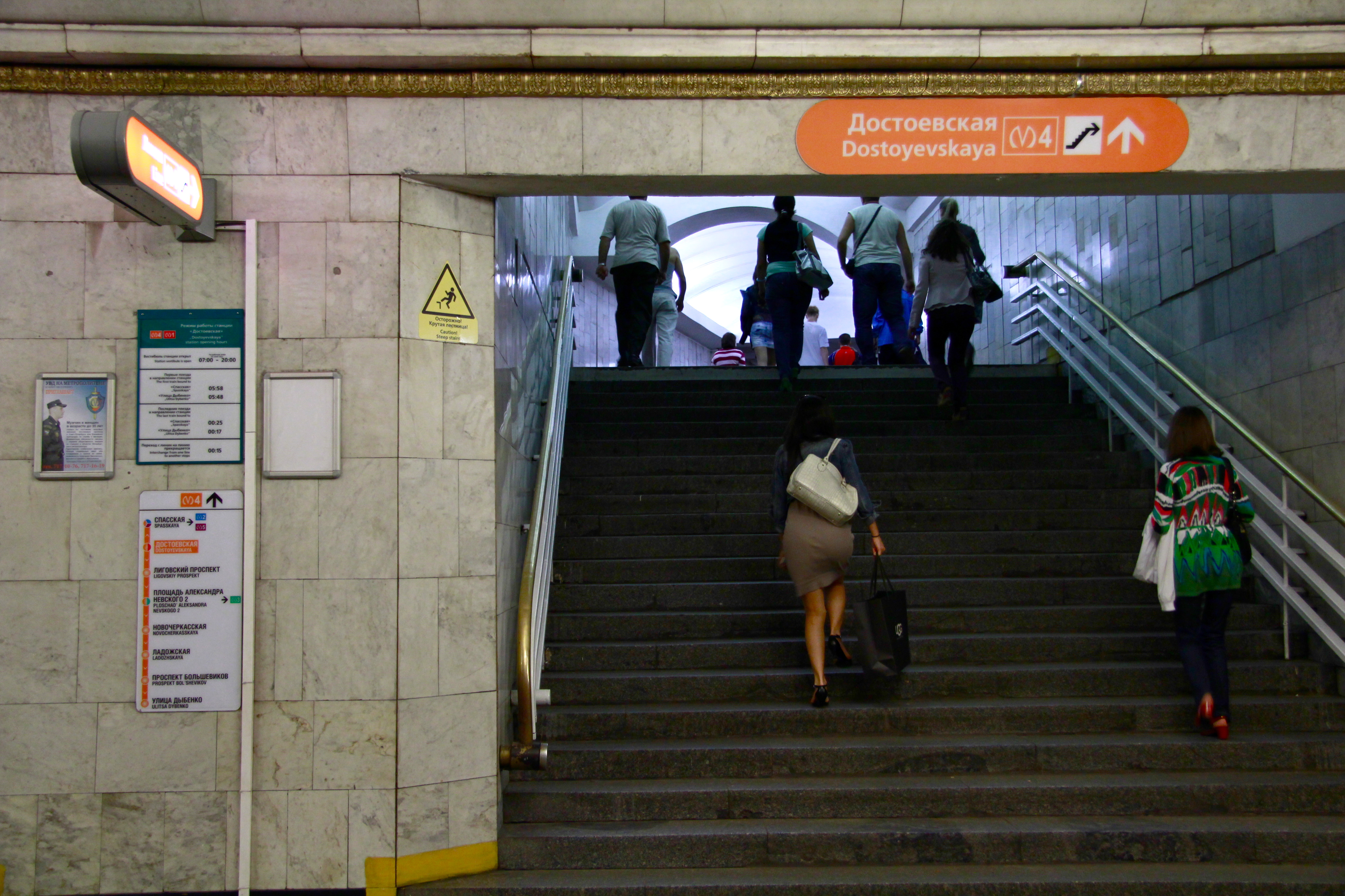 St. Petersburg Metro (Петербургский метрополитен) Kirovsko-Vyborgskaya Line (Кировско-Выборгская линия)